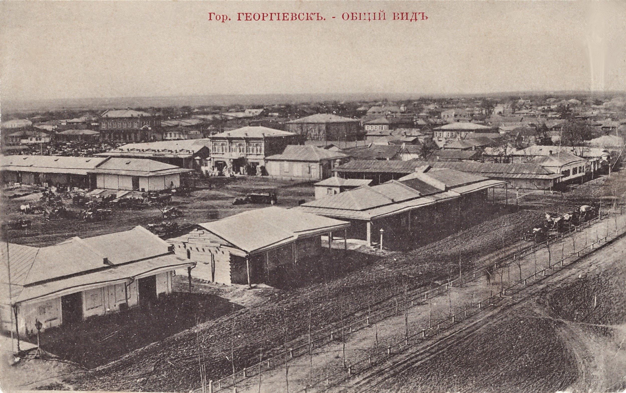 Общий вид Георгиевска. Начало XX века